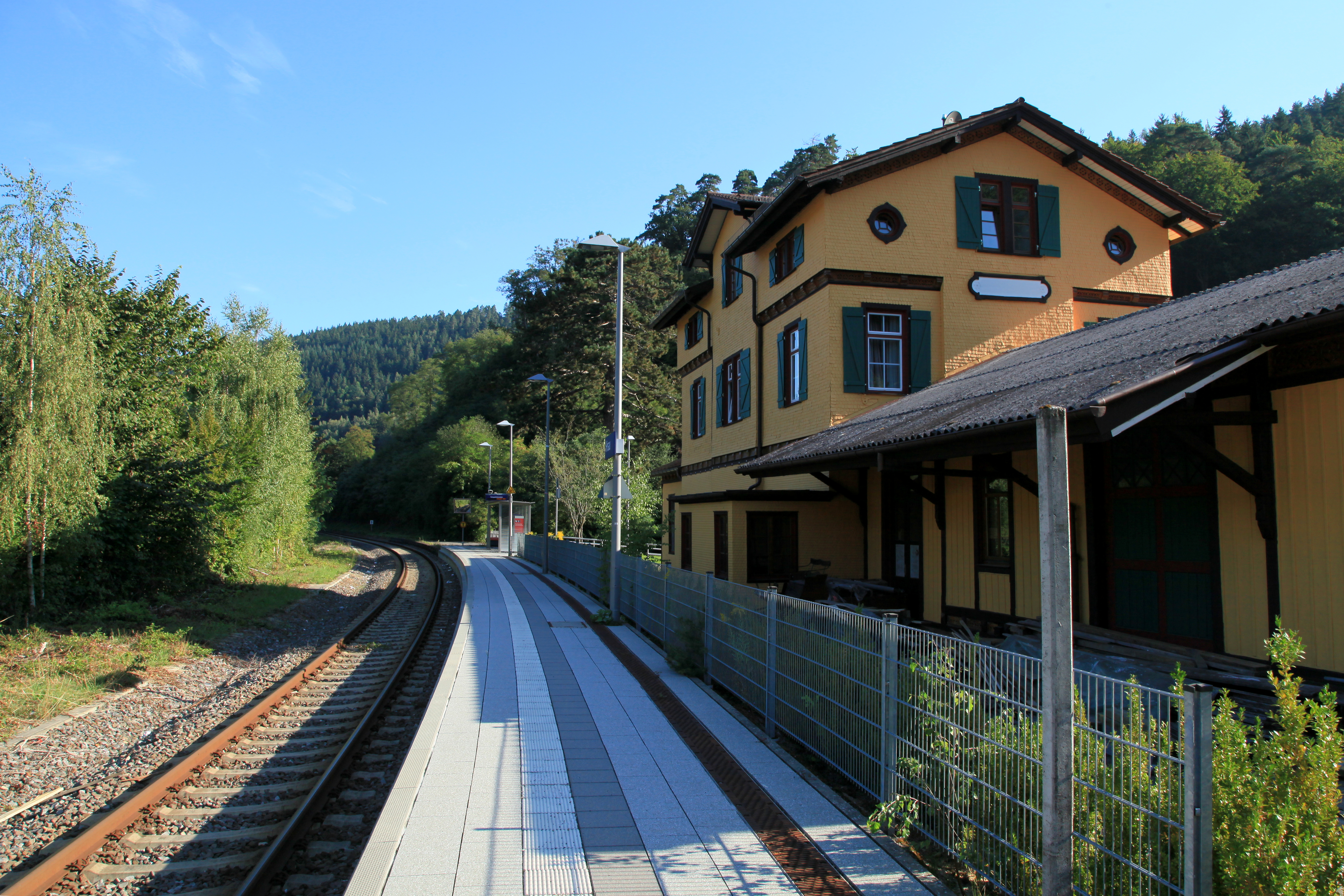 Bahnhof Hirsau, Am Tälesbach in Hirsau, Calw